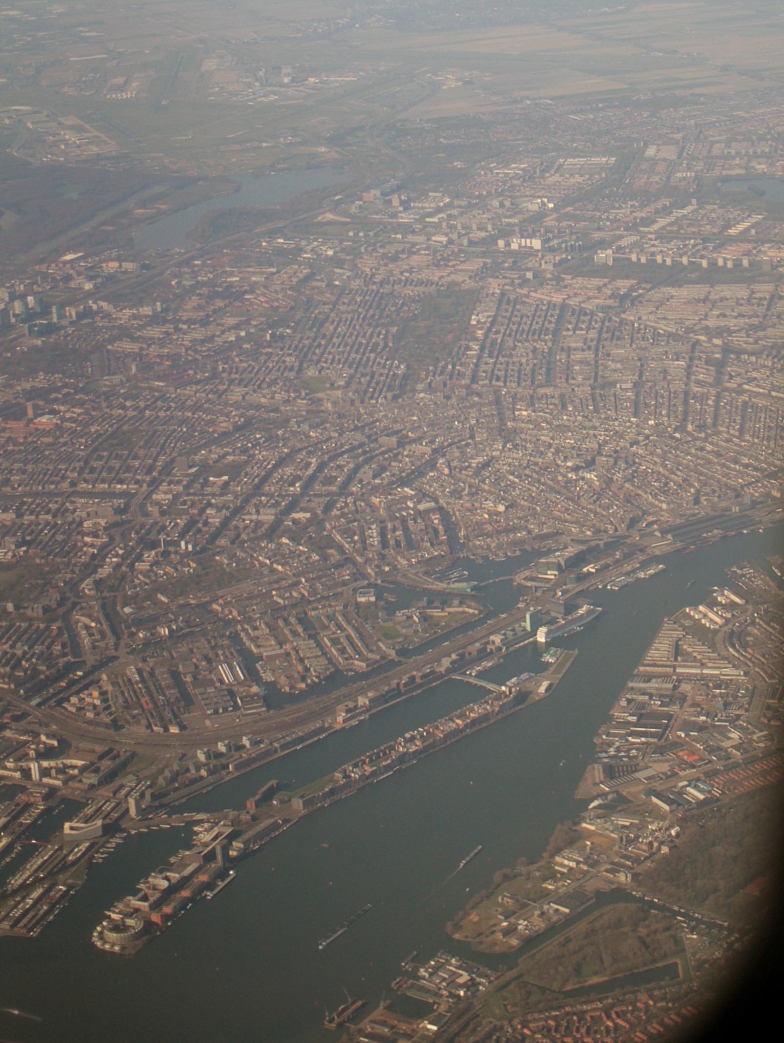 Het KNSM eiland, gezien vanuit het Oosten